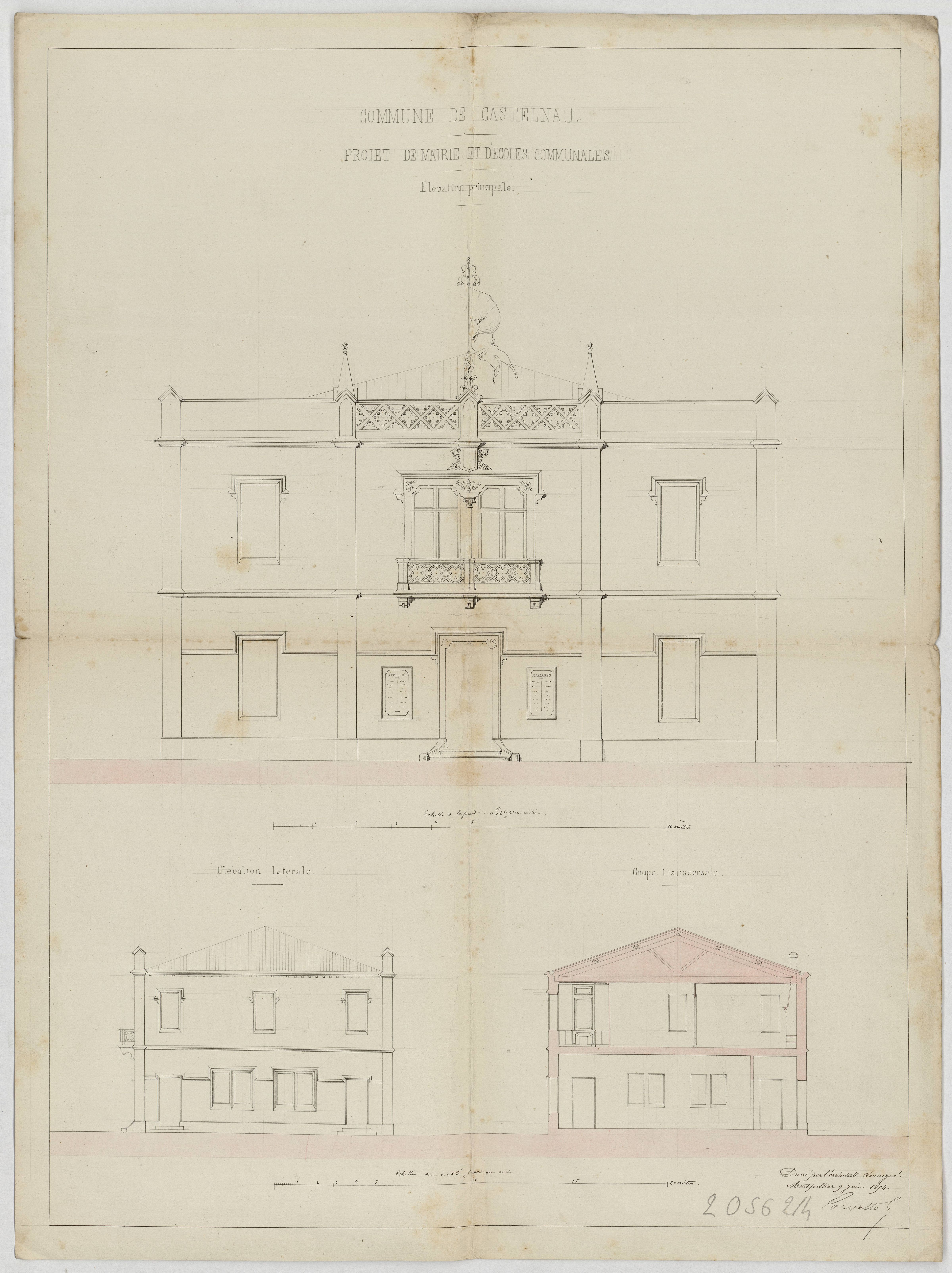 Castelnau-de-Guers. - Projet de mairie et d'écoles communales : plan